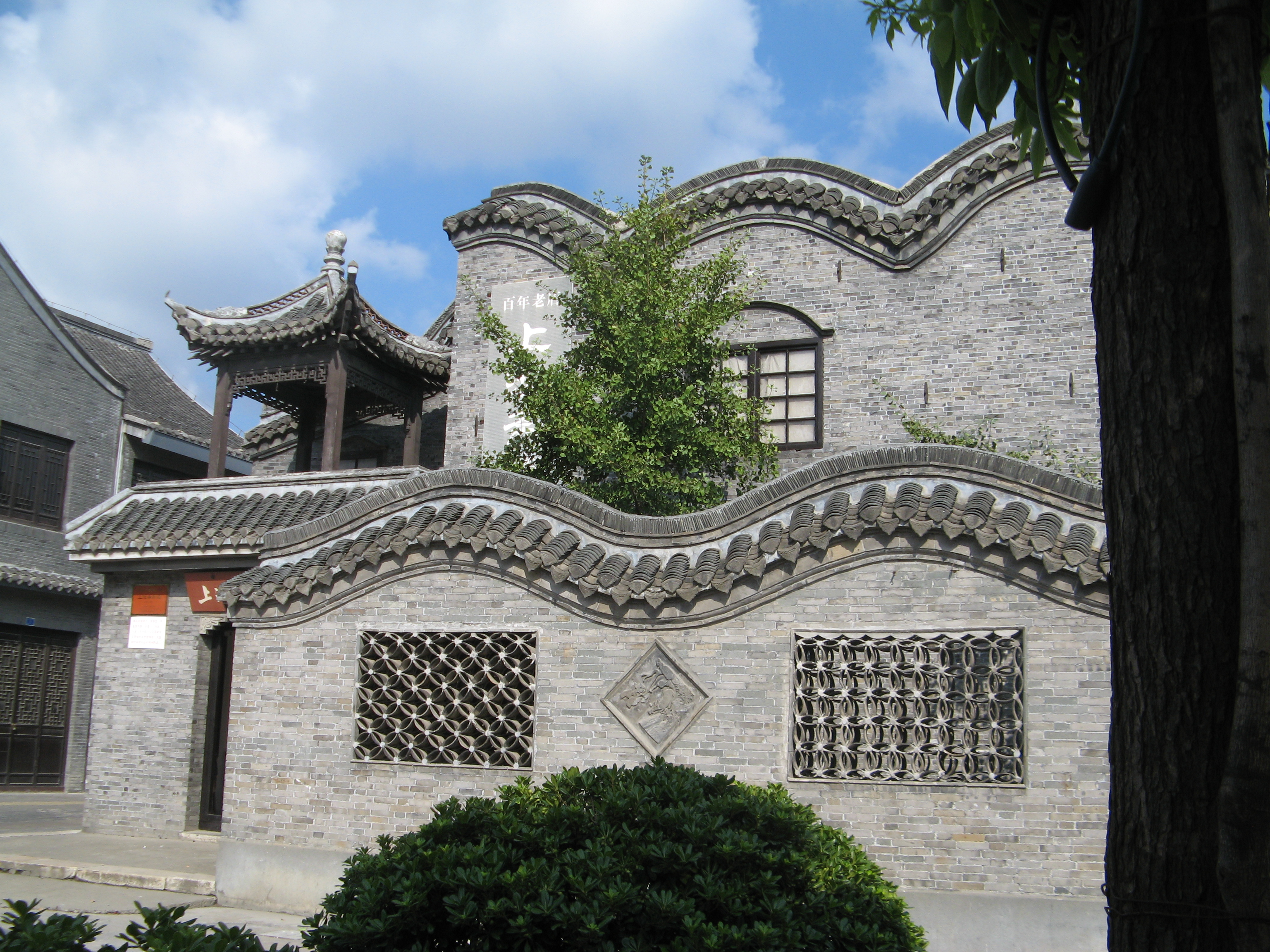 中文（中国大陆）: 上池斋药店（江苏兴化，国家级文物保护单位）